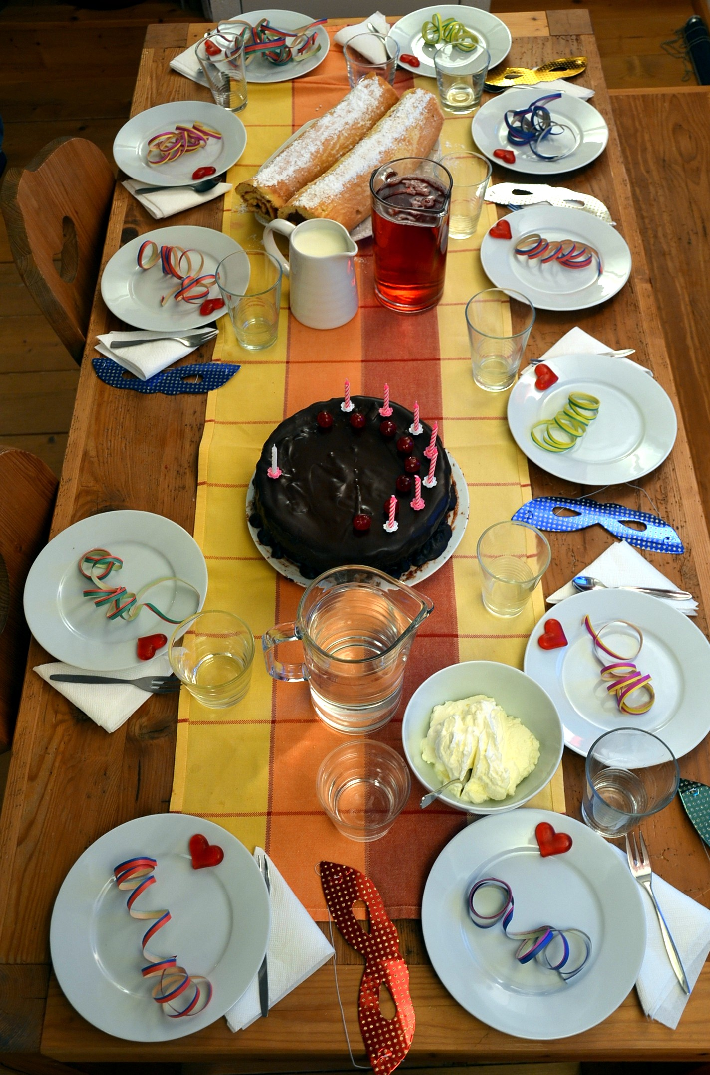 Gedeckter Geburtstagstisch für eine Kinderfeier